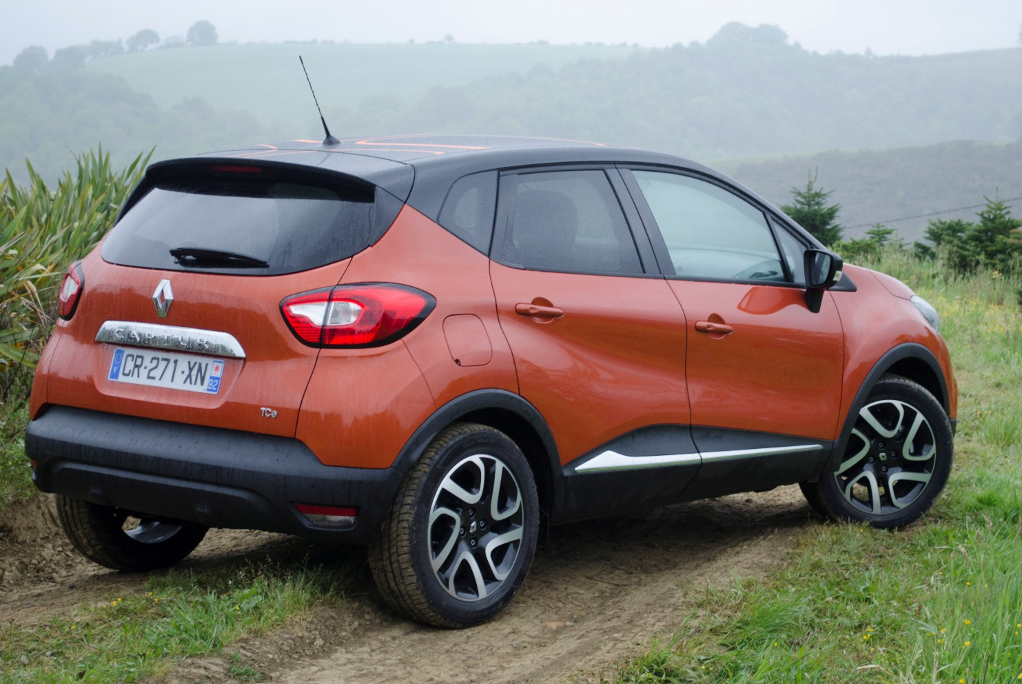 Egy Renault Captur földúton.